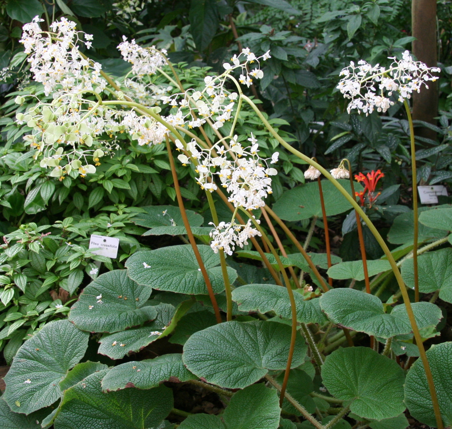 Begonia acida im Botanischen Garten Dresden